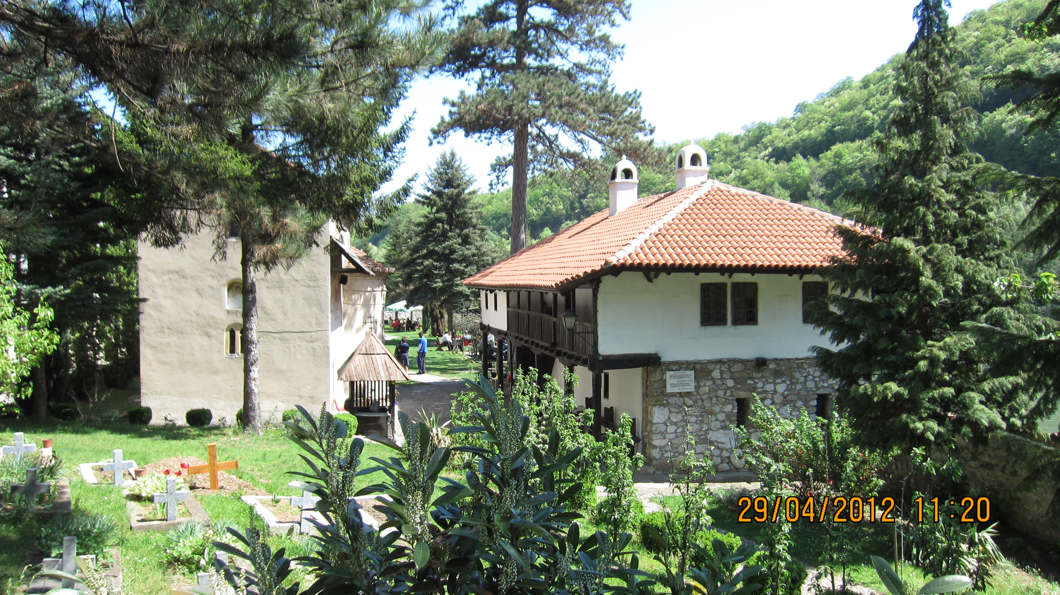 Manastir je najstarija crkva medju Ovcarsko-Kablarskim manastirima. Potice iz srednjeg veka. Cuveno je Nikoljsko jevandjelje, kao najstariji rukopis pisan na pergamemntu.